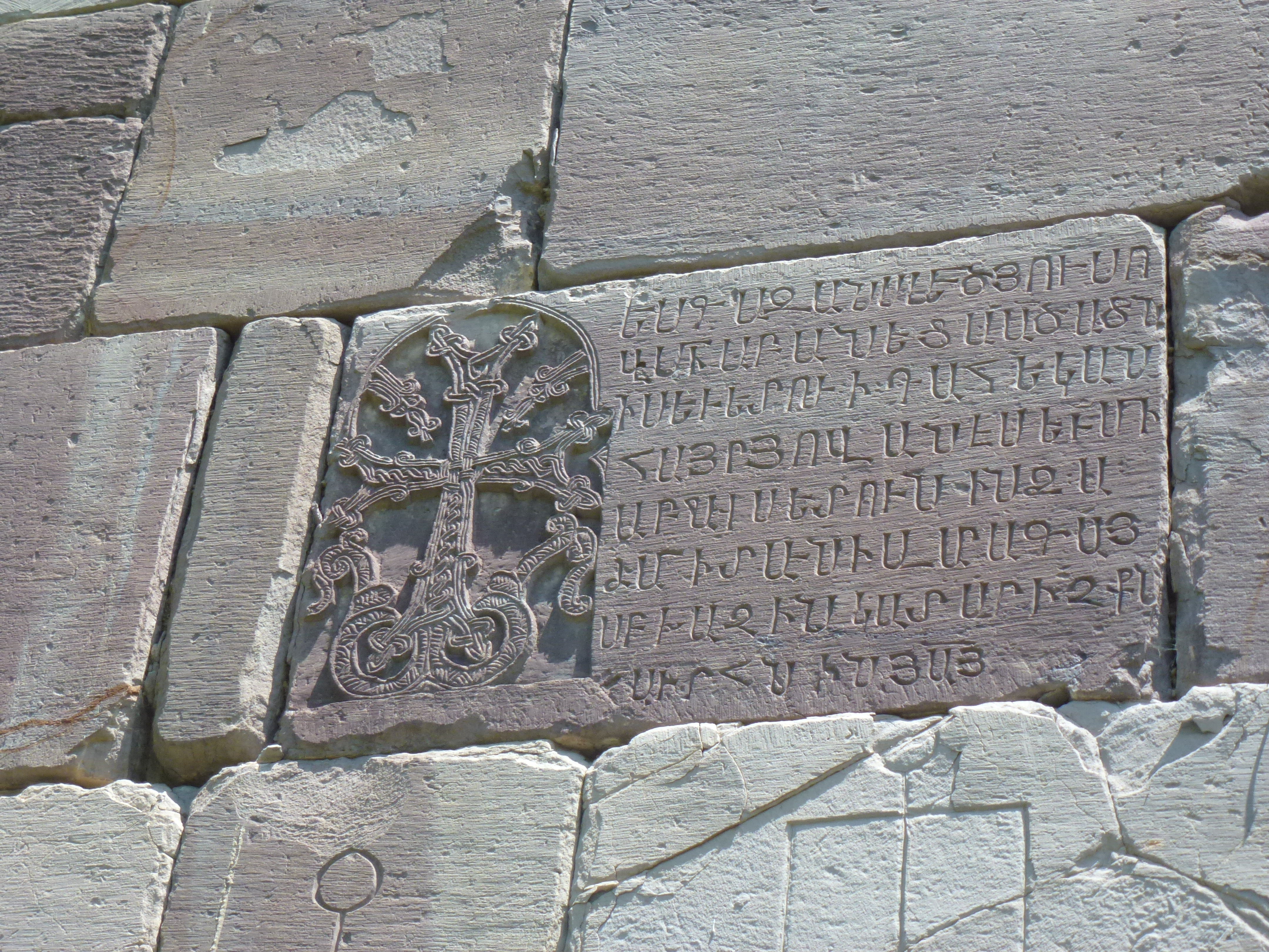 Մակարավանք, Աչաջուր, Հայաստան 13/6.3